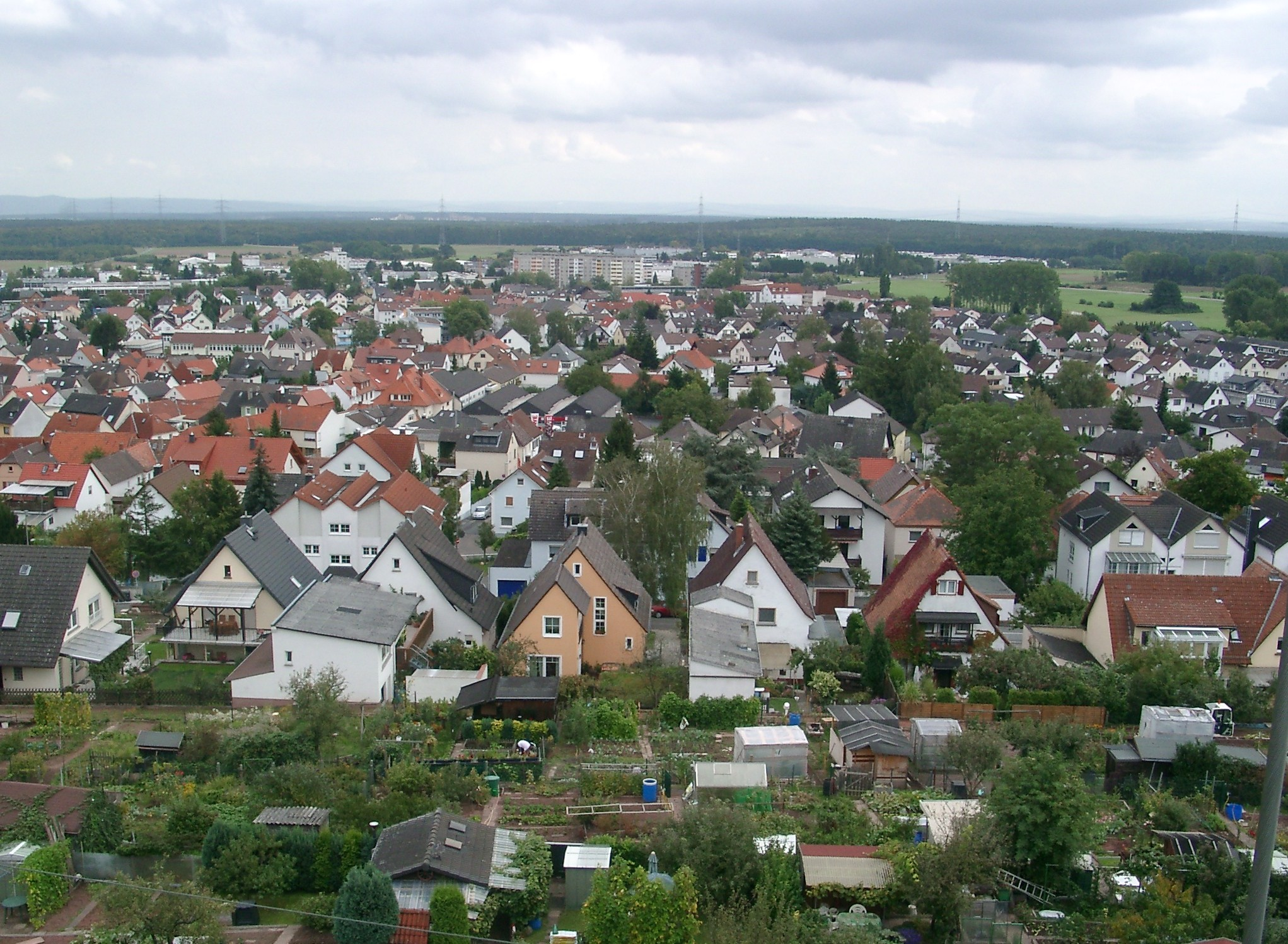 Dietzenbach, Stadtansicht vom Aussichtsturm auf dem Wingertsberg